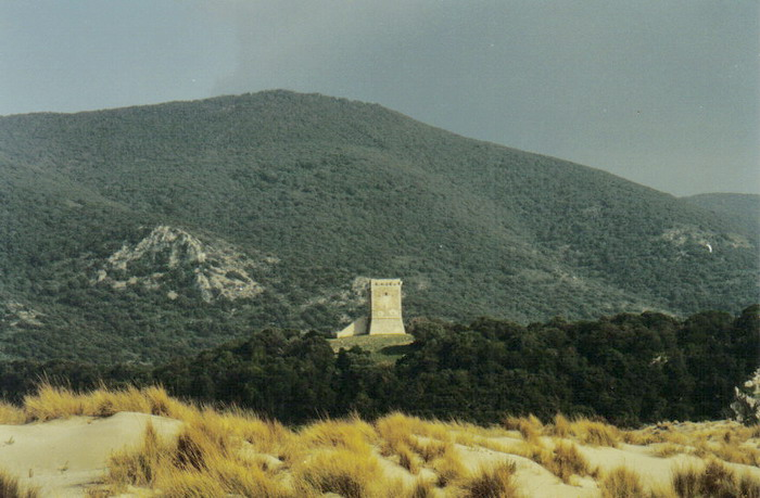 La Torre di Collelungo nel Parco naturale della Maremma; foto scattata nel febbraio 2002 con apparecchio non digitale da Vinattieri Matteo che lascia in pubblico dominio dopo parziale rielaborazione